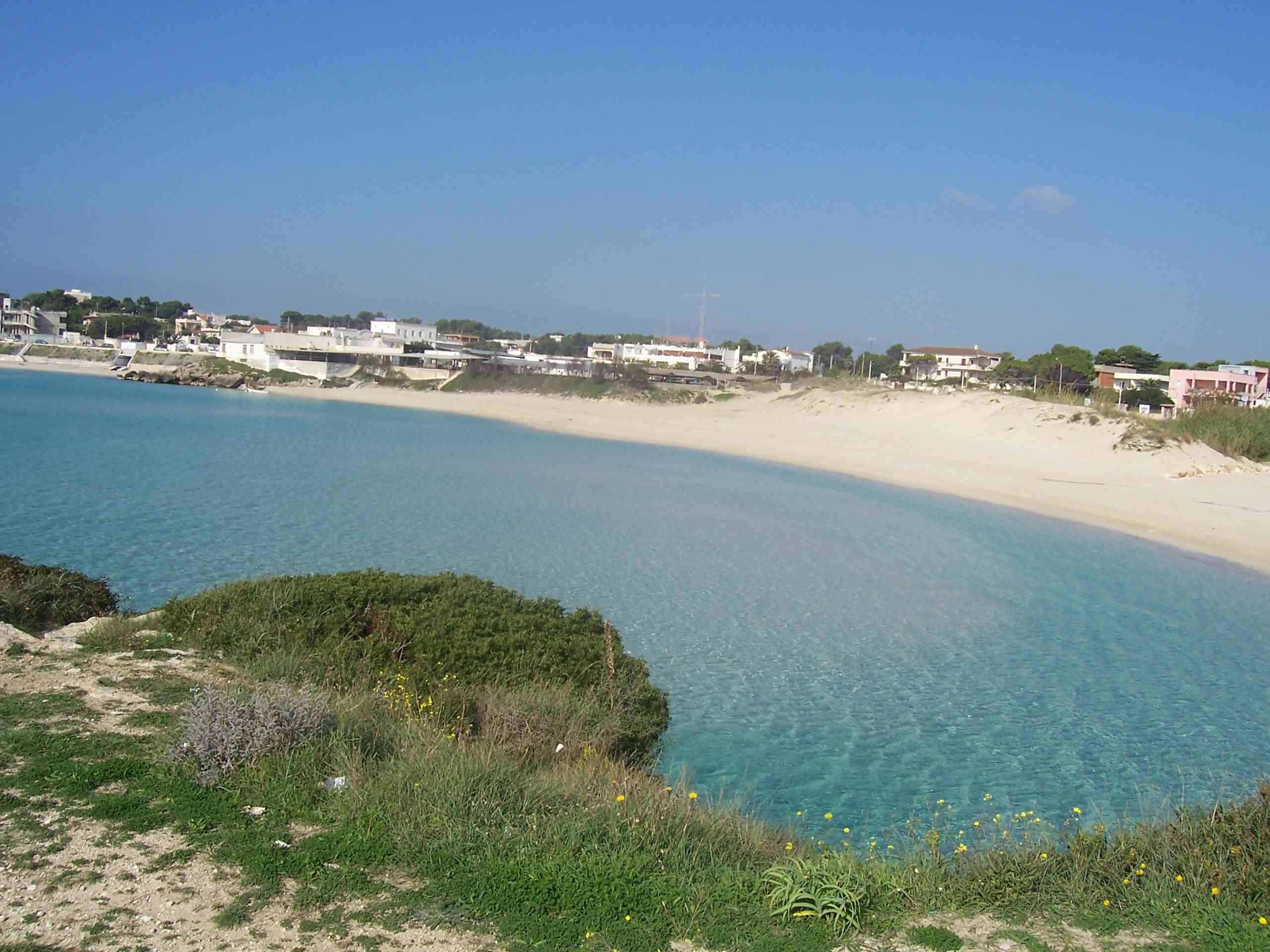 Marina di Pulsano - Autore:Asia 29 ottobre 2005